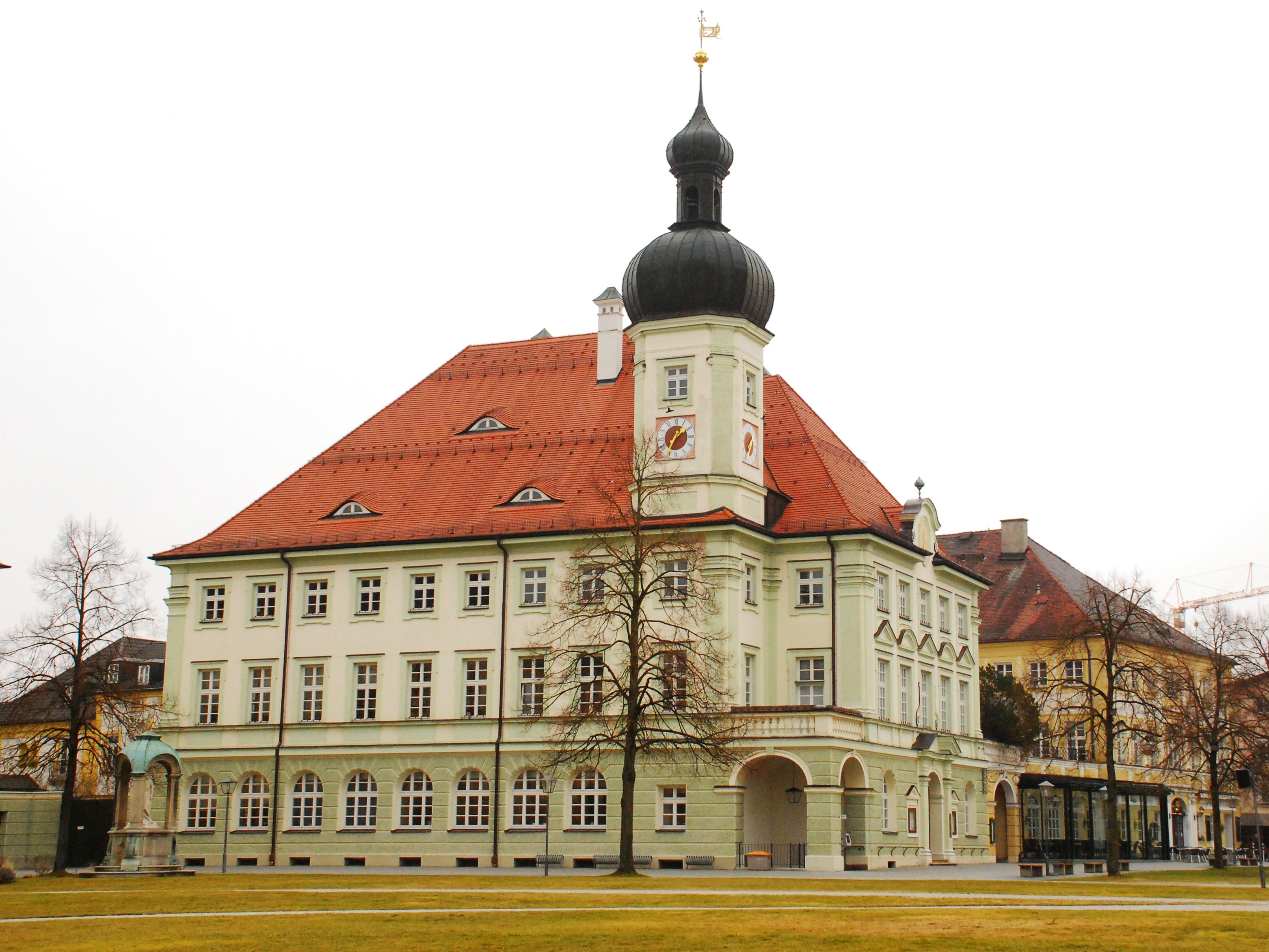 Rathaus Kapellplatz 2a in Altötting, Landkreis Altötting, Regierungsbezirk Oberbayern, Bayern. Als Baudenkmal unter Aktennummer D-1-71-111-17 in der Bayerischen Denkmalliste aufgeführt. Laut Denkmalliste errichtet 1908 durch Rudolf Esterer.